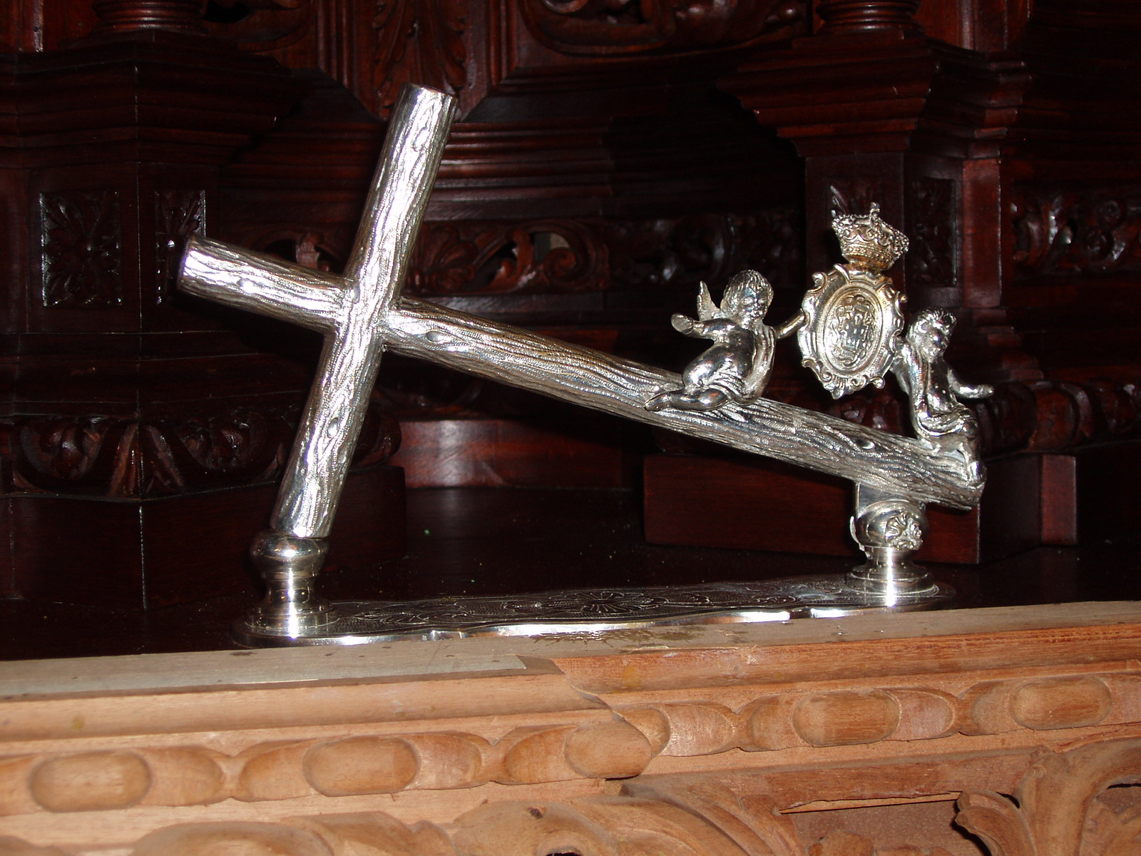 Llamador